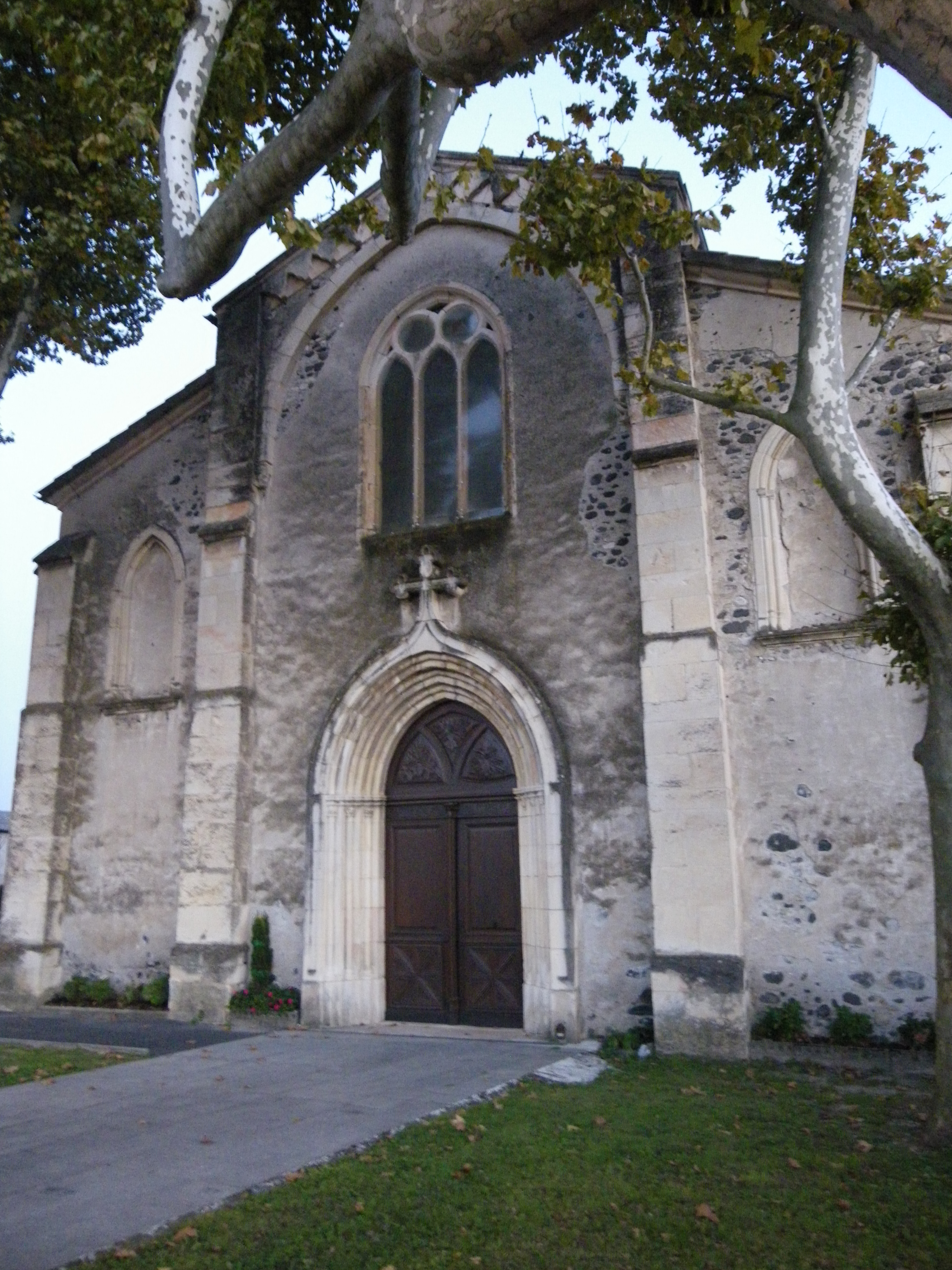 Meysse (Ardèche, France), nouvelle église Saint-Jean-Baptiste, XIXe siècle, non classée M.H., car seule l'ancienne église St Jean-Baptiste (Xe et XIIe siècles) l'est.